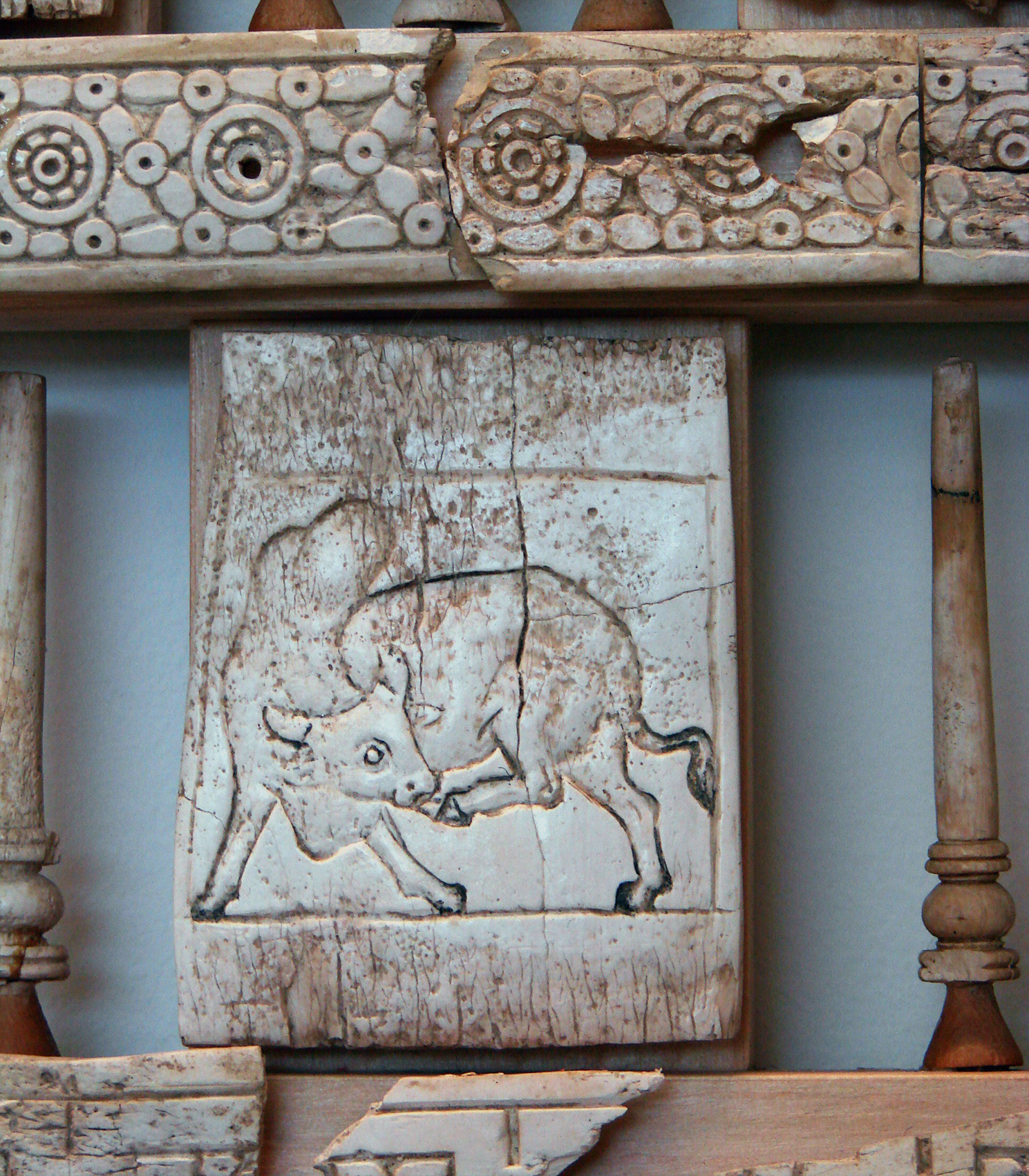 Détail d'un coffret, ivoire, 1er siècle après JC, trésor de Begram, région du Kapiça, Afghanistan. Musée Guimet, Paris.